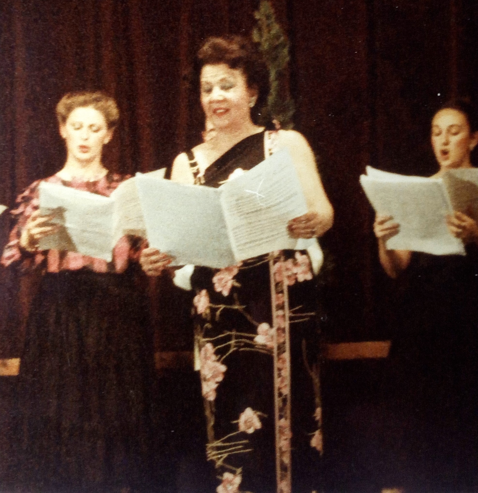 Concert du conservatoire de Toulon. Schubert D838